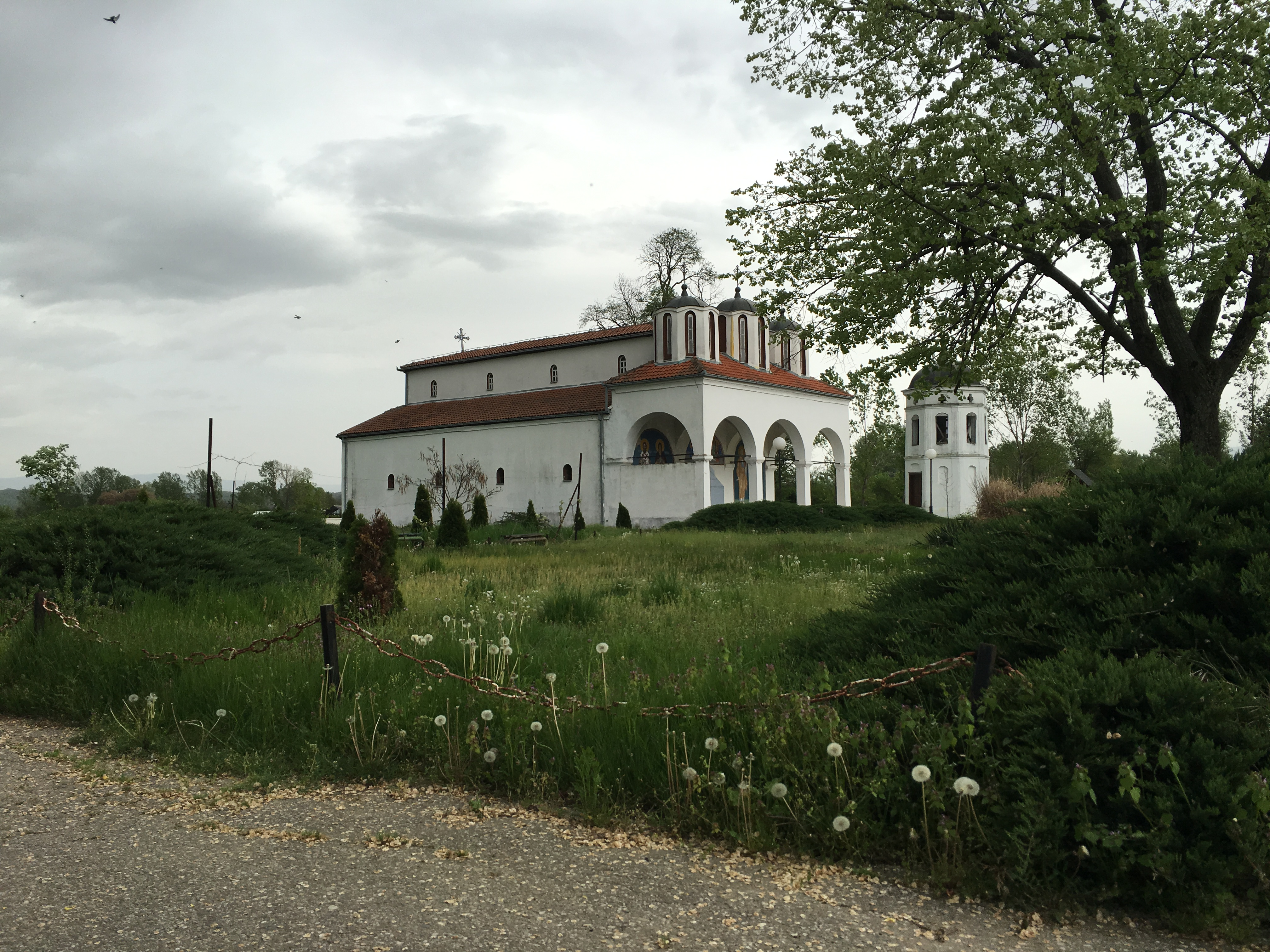 Srpski (latinica): Crkva Sabor svetih apostola, Turekovac